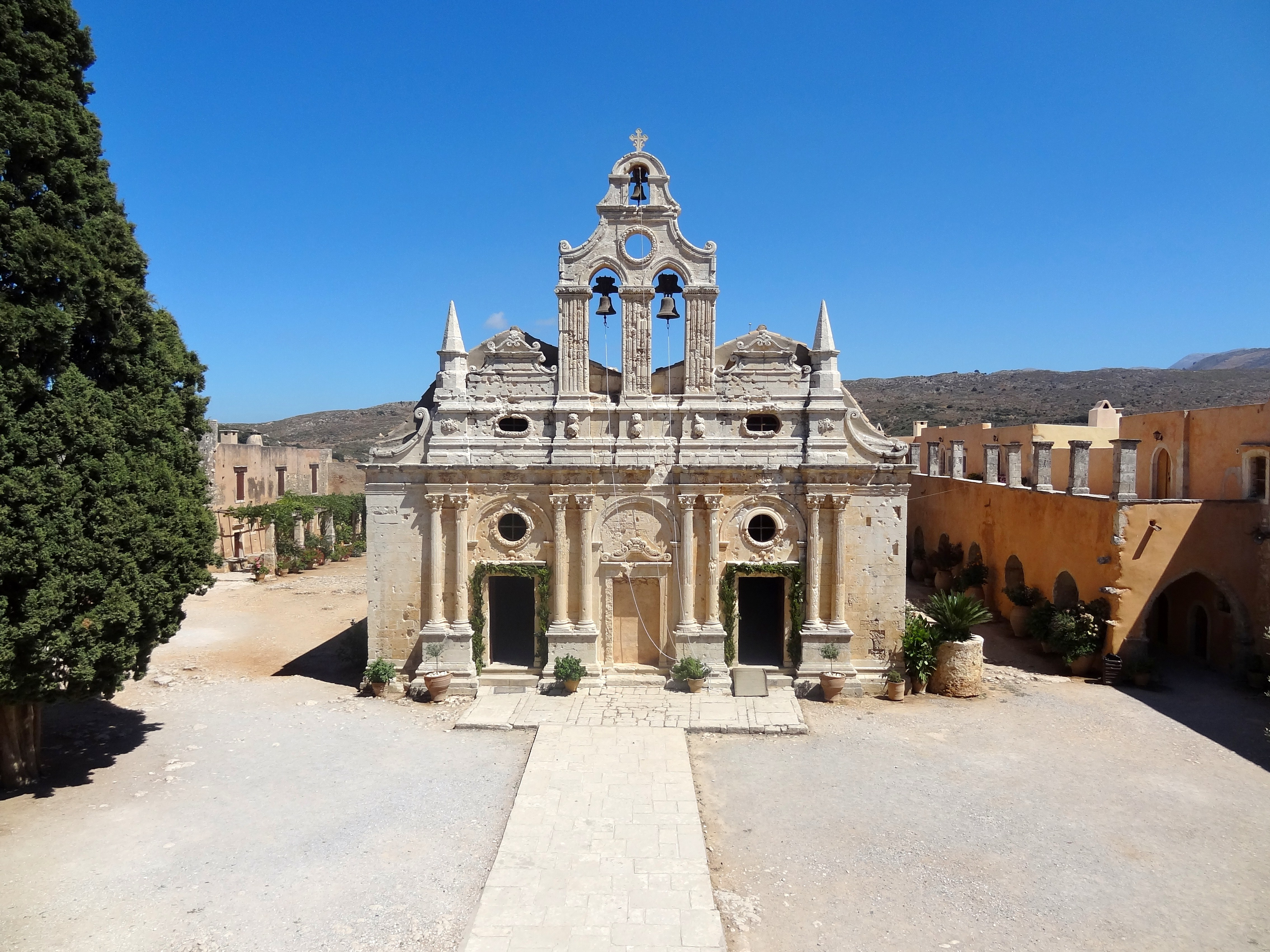 Westseite der Klosterkirche im Kloster Arkadi, Gemeinde Rethymno, Regionalbezirk Rethymno, Kreta, Griechenland